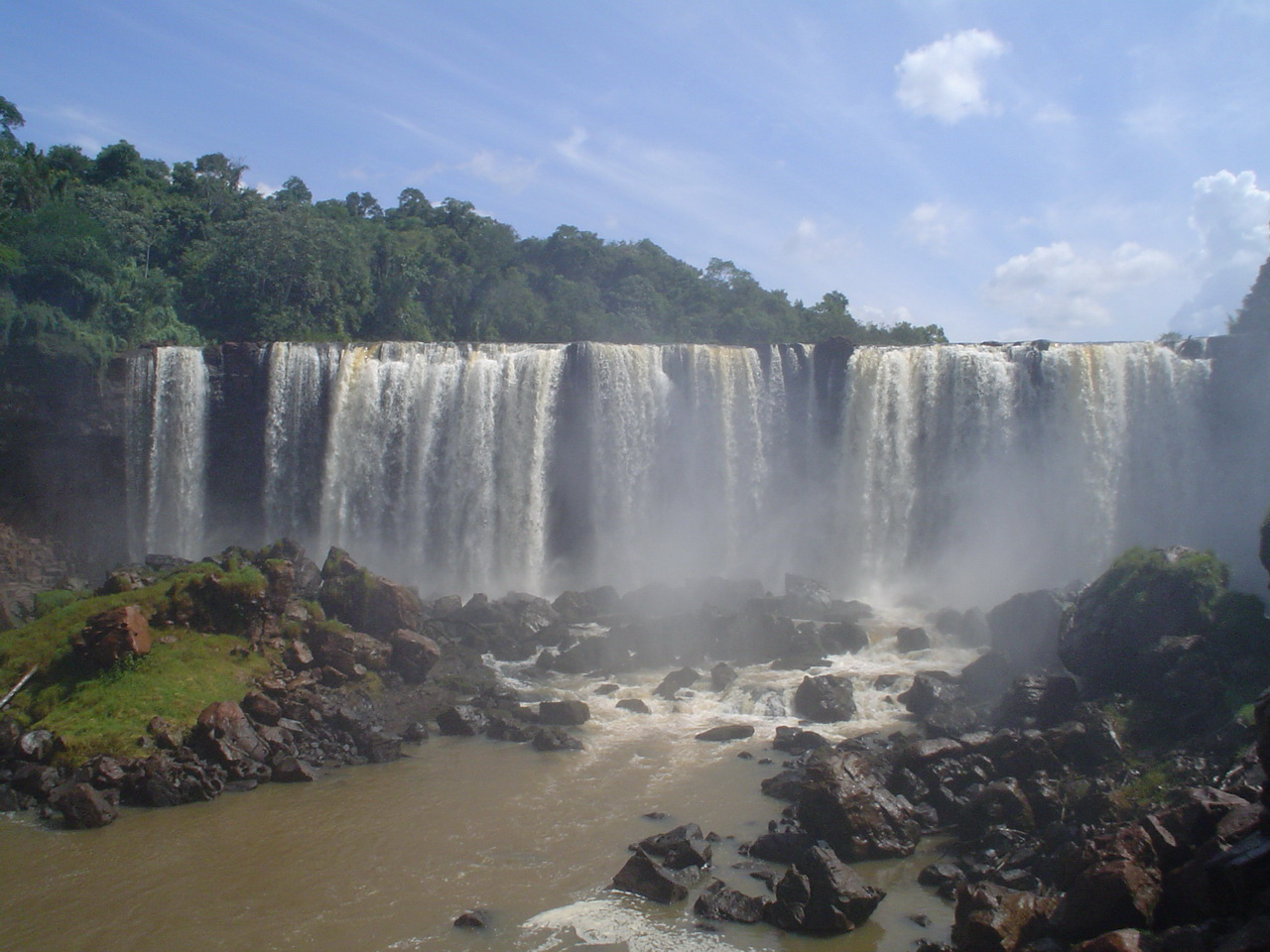 Fotos de los refugios y reservas de Itaipu, tomadas en los años 2007 y 2008 por mí